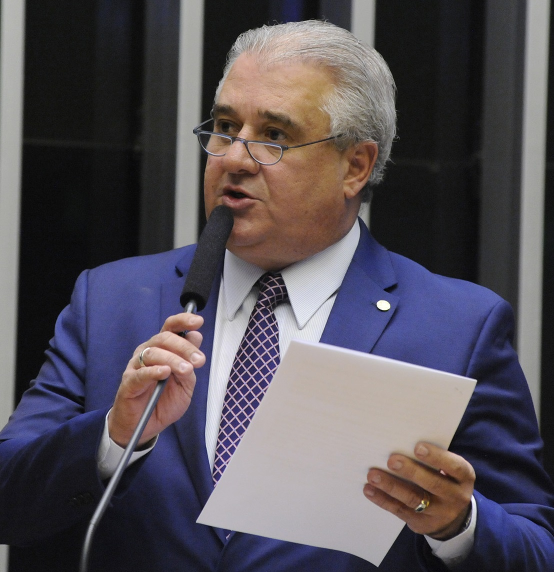 Augusto Coutinho em outubro de 2017.